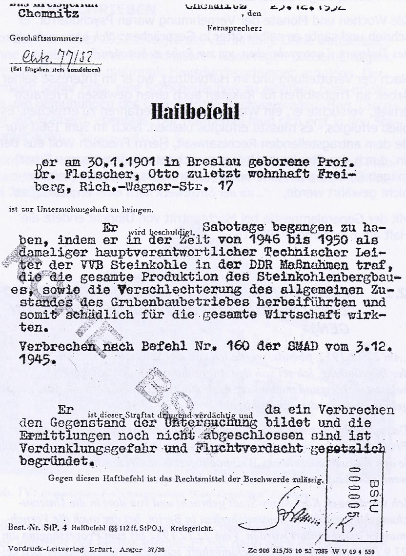 Haftbefehl für Otto Fleischer vom 23. Dezember 1952. Kopie der Auskunft der Behörde des/der Bundesbeauftragten für die Unterlagen des Staatssicherheitsdienstes (BStU)